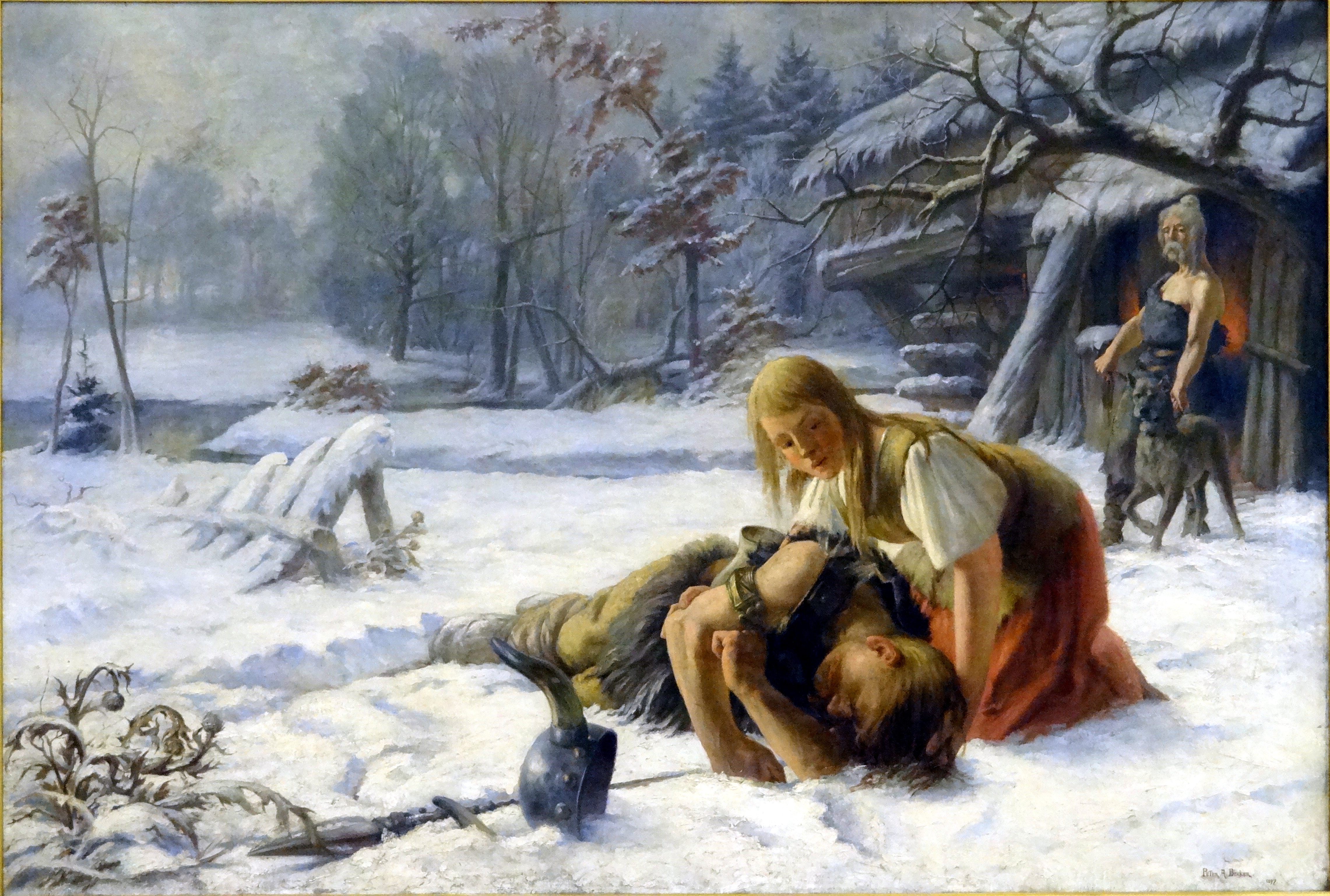 Tableau de Peter Becker, représentant la fondation légendaire de Mulhouse. Même image que Peter_Becker_Mulhouse.jpg, avec une meilleure résolution.